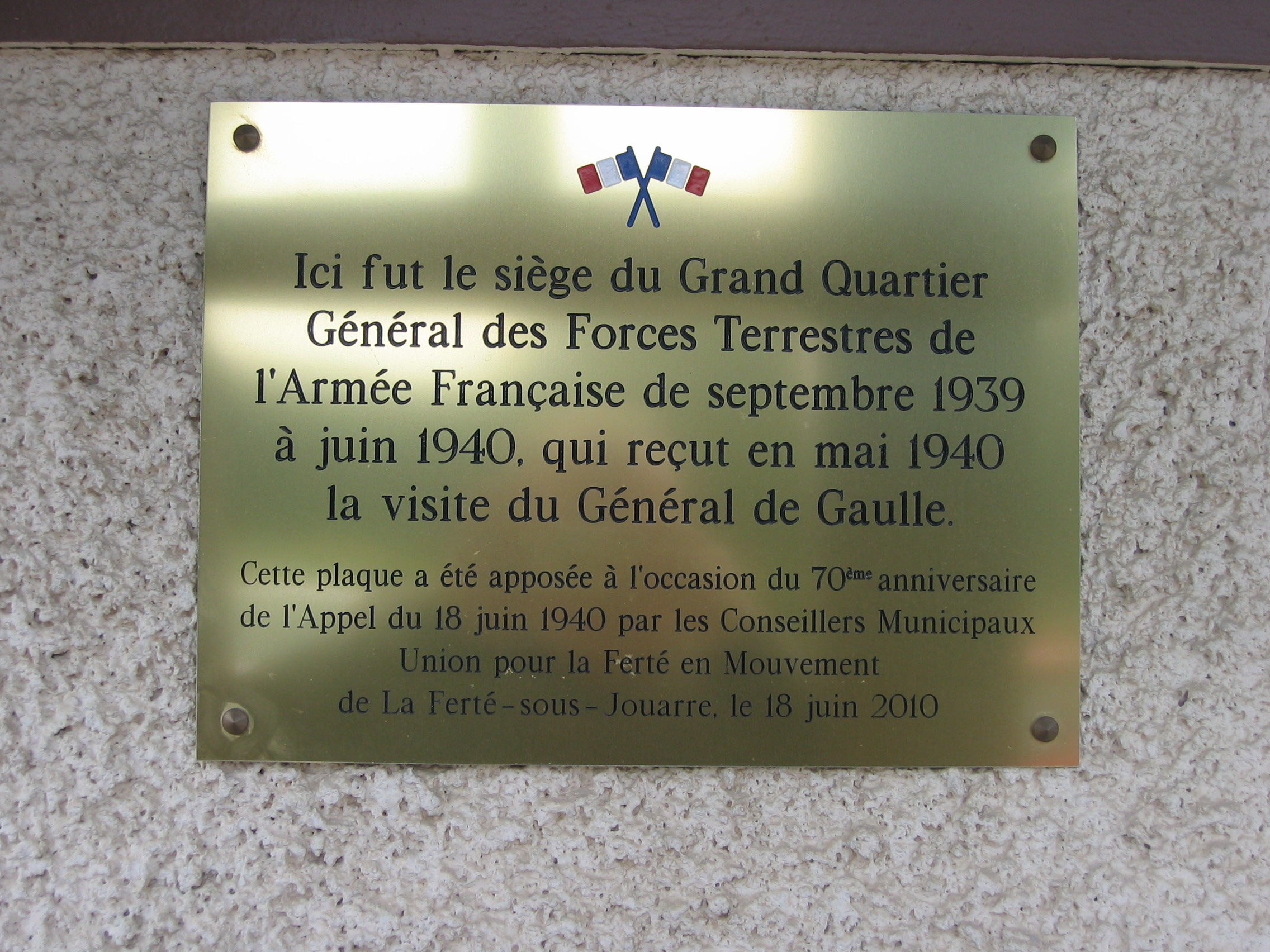 Plaque commémorative à l'entrée de l'hôtel des Bondons à La Ferté-sous-Jouarre Seine-et-Marne France